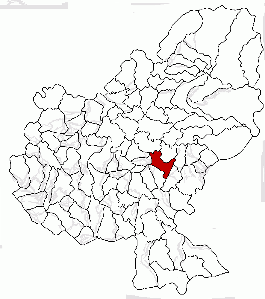 Categorie:Hărţi ale judeţului Mureş